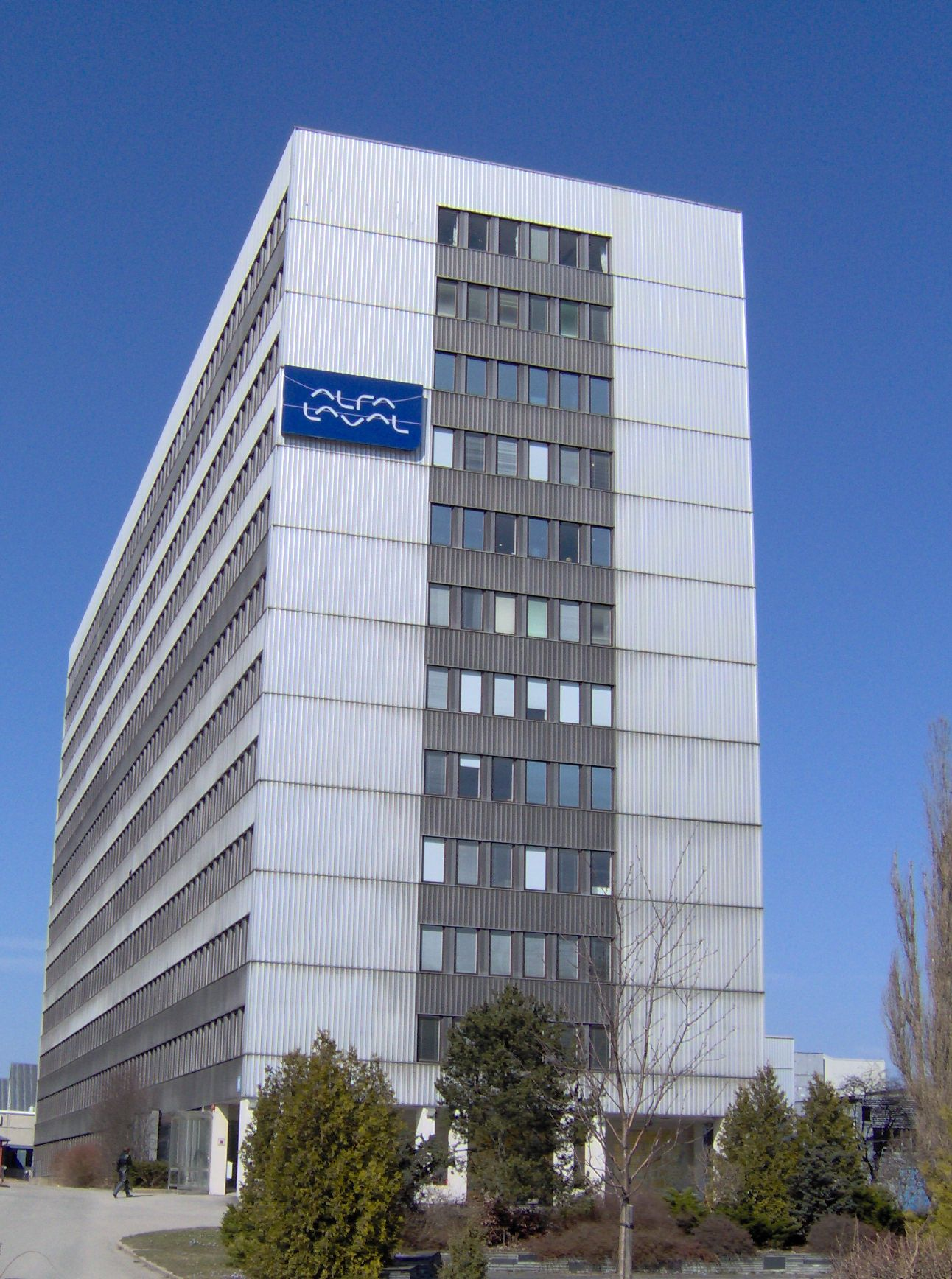 Alfa-Lavals Tumbakontor 2006